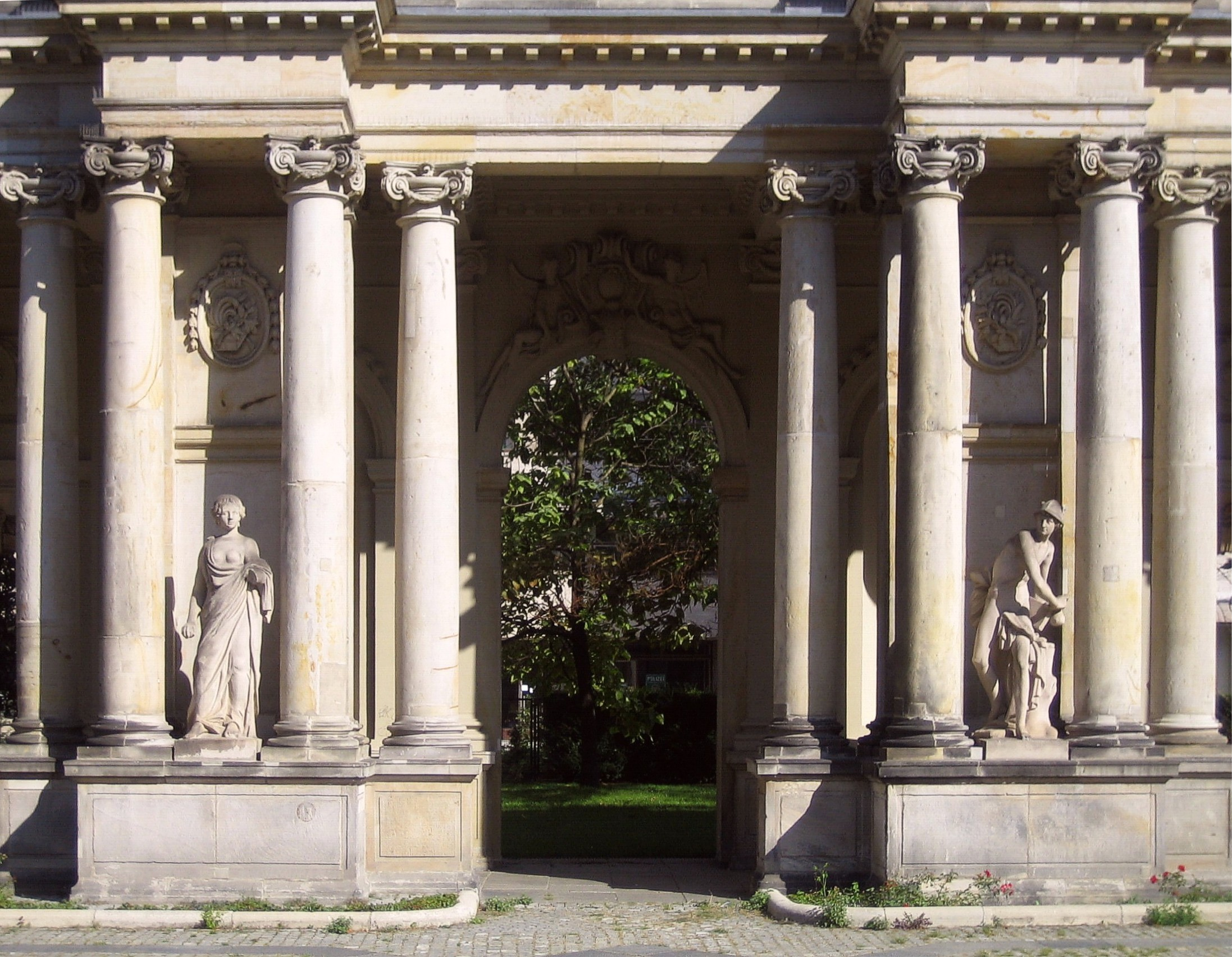 Die Königskolonnaden als Zugang zum Heinrich von Kleist-Park in Berlin-Schöneberg. Details.